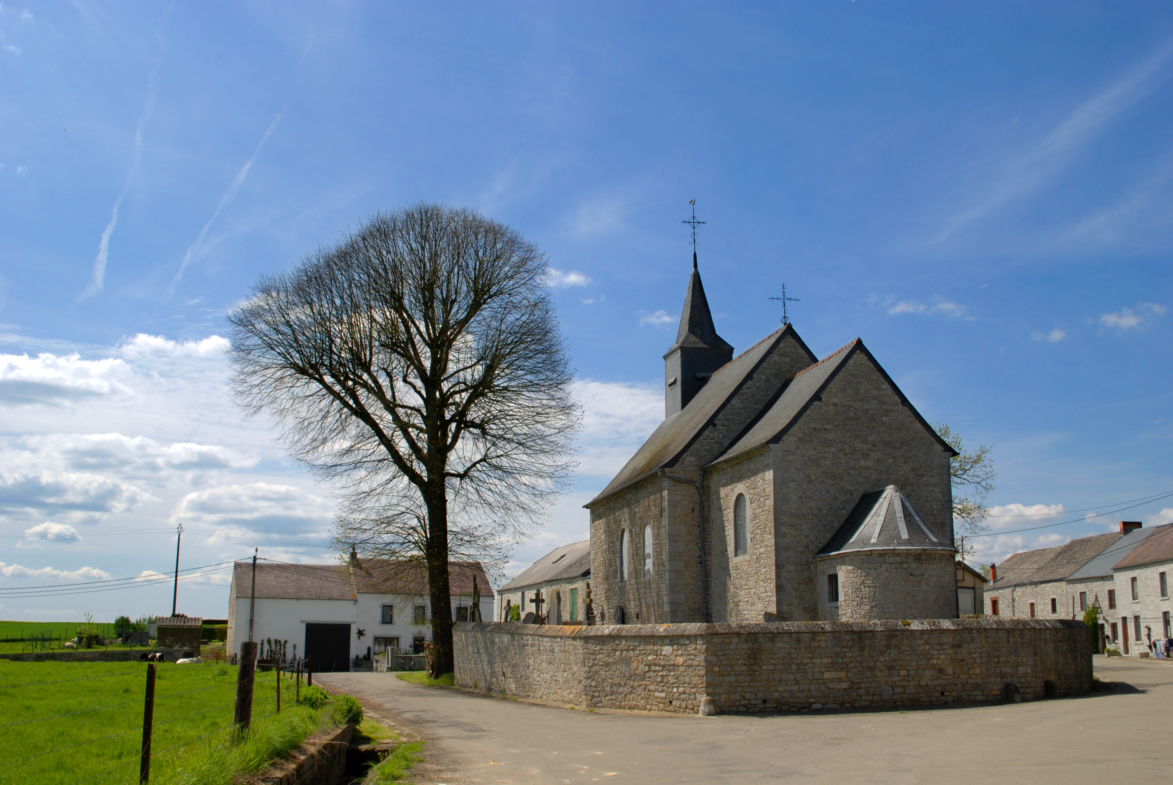 Eglise Notre-Dame de l'Assomption à Niverlée (Doische)